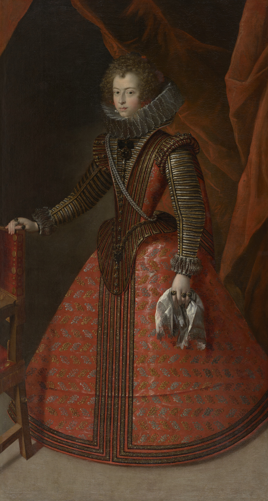 Retrato de la infanta María Ana de Austria, por el pintor Felipe Diriksen (también conocido como Felipe Diricksen o Deriksen, según firmaba sus cuadros). Realizado el año 1630 y conservado en el Portland Art Museum.